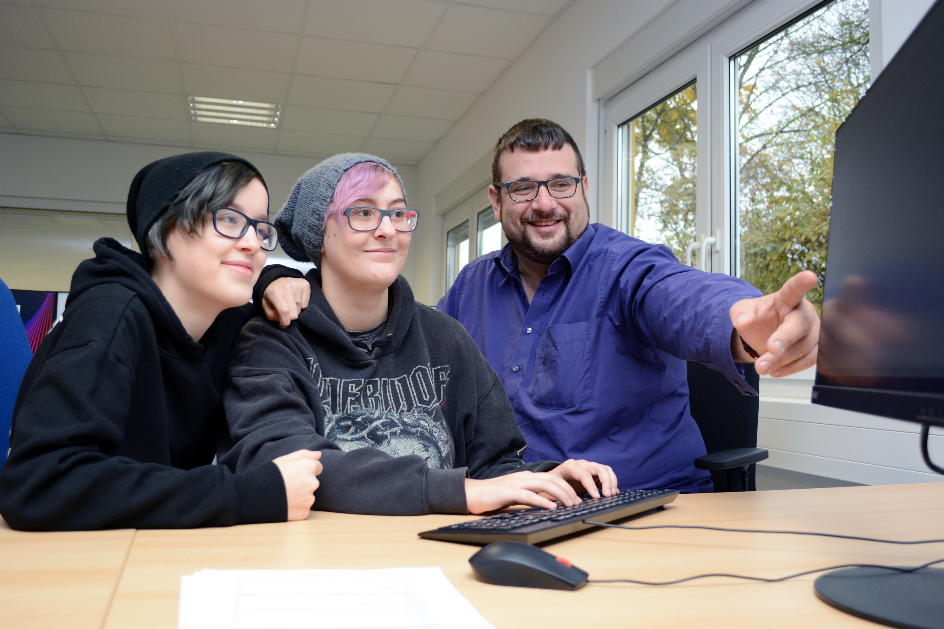 Berufsbildungswerk Abensberg - Ausbildungsbereich IT